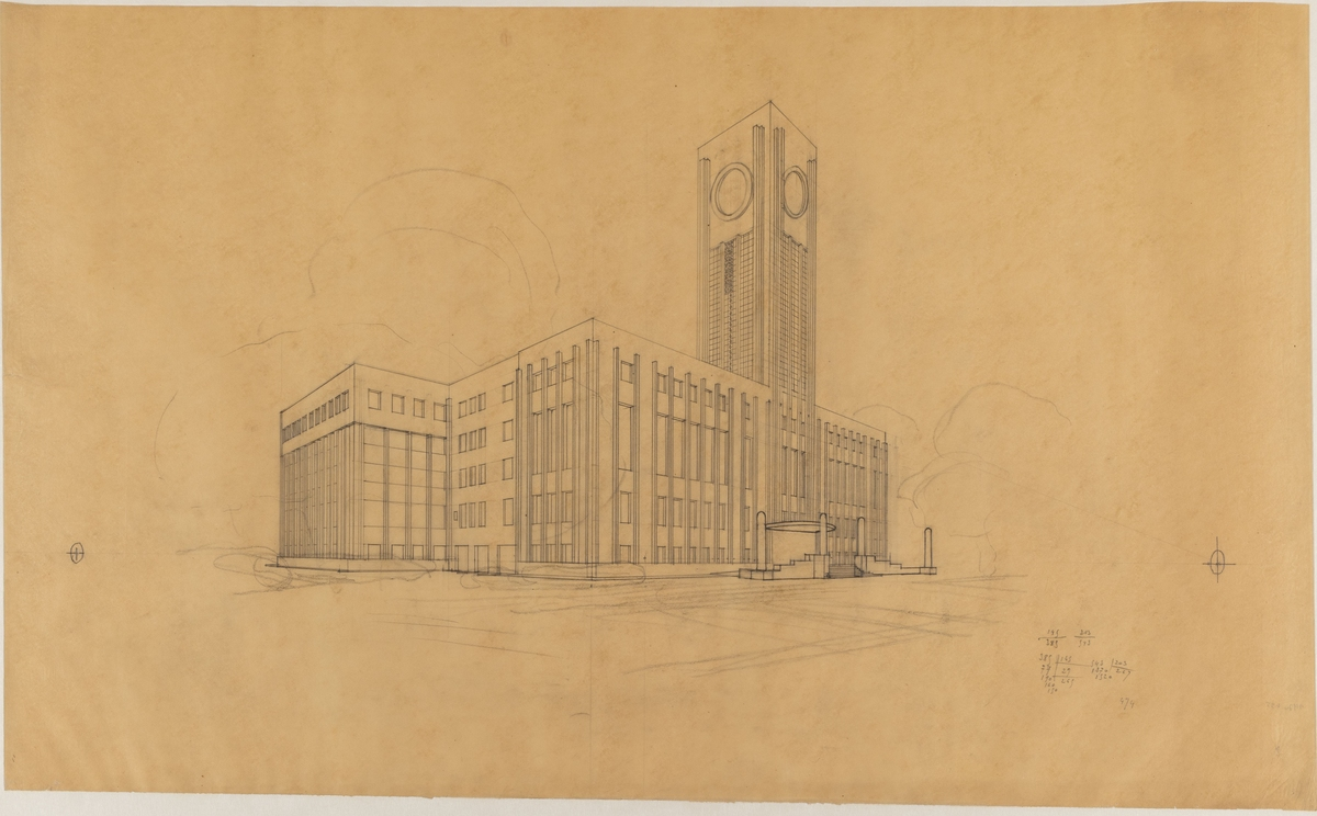 Tony Garnier, mairie de Boulogne-Billancourt, projet 2